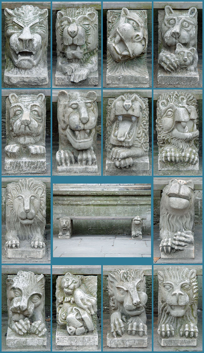 Beschreibung: Bänke auf Löwenskulpturen vor dem Dom in Braunschweig Aufnahmedatum: Fotografiert am 3. März 2003 Fotograf: ArtMechanic